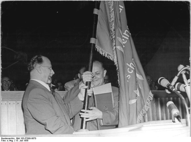 Zentralbild 15.7.1958. V. Parteitag der SED vom 10. bis 16.7.1958 in der Werner-Seelenbinder-Halle, Berlin, 6. Tag: Unter begeisterter Anteilnahme aller Delegierten und Gäste wurde die erstmalige Verleihung des vom ZK beschlossenen Ehrenbanners durch den 1. Sekretär des ZK der SED, Walter Ulbricht, vorgneommen. Im Sozialistischen Wettbewerb zu Ehren des 5. Parteitages gingen in der Gruppe der Bezirke mit vorwiegend industriellen Charakter die Parteiorganisation des Bezirkes Karl-Marx-Stadt, in der Gruppe des Bezirks mit industriellen und landwirtschaftlichem Charakter Magdeburg und in jener mit überwiegend landwirtschaftlichem Charakter der Bezirk Frankfurt-Oder als Sieger hervor. UBz: Walter Ulbricht überreicht dem 1. Sekretär der Bezirsleitung Karl-Marx-Stadt der SED. Walter Buchheim (rechts) das Ehrenbanner.